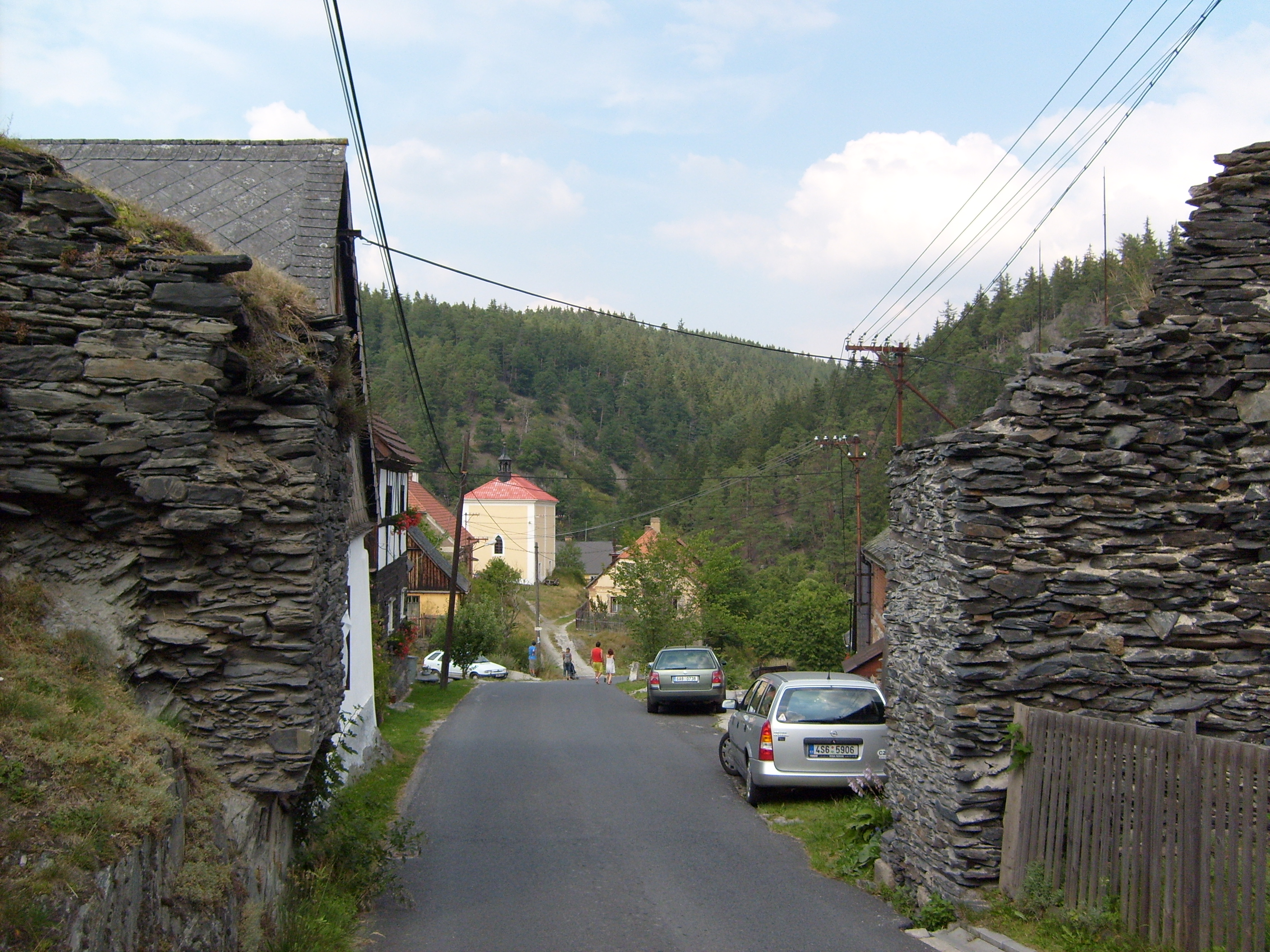 Rabštejn nad Střelou, Plzeň region, Czech Republic